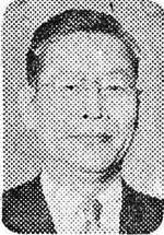 정일형